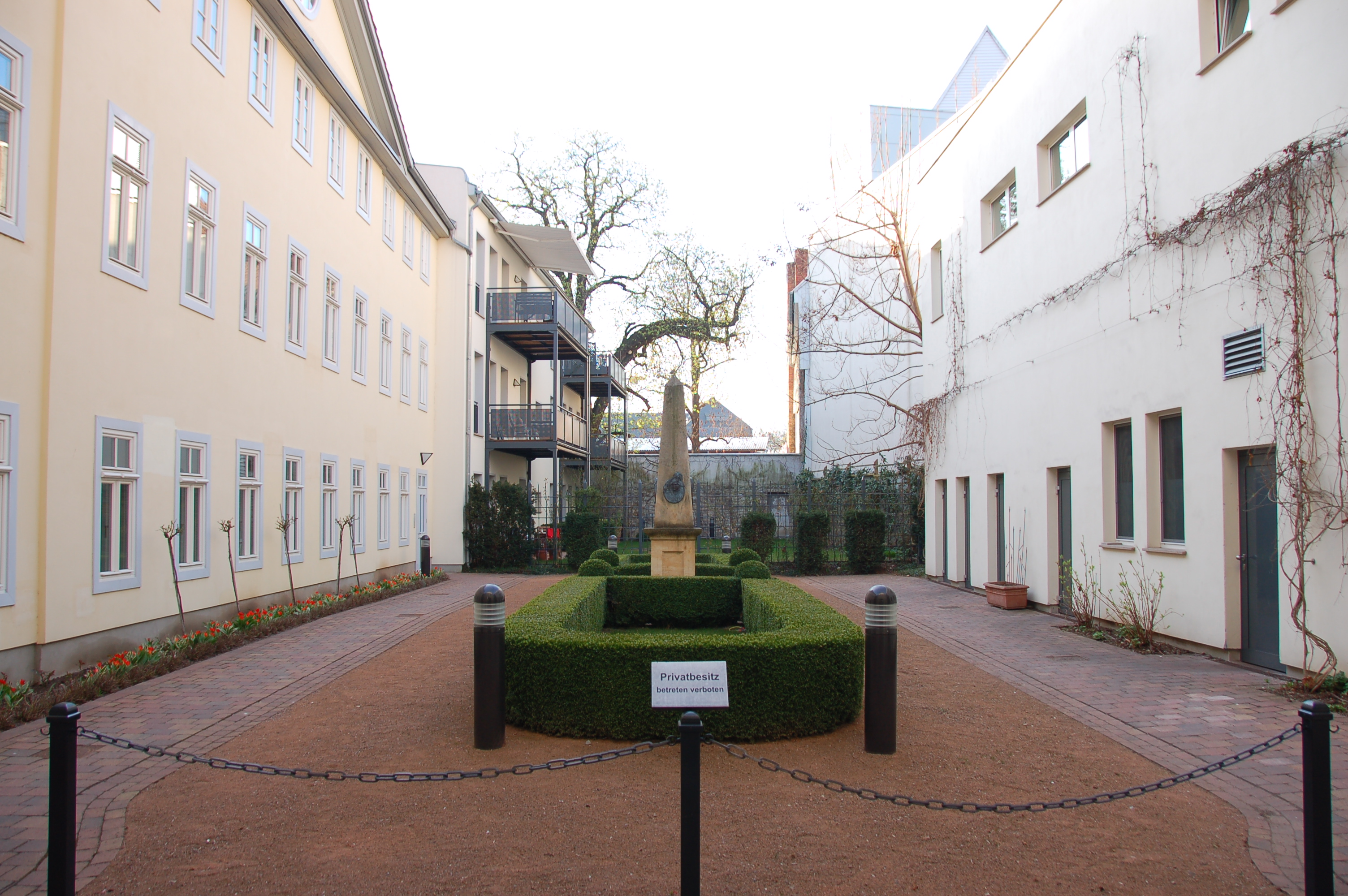 Erfurt Anger 6 Innenhof